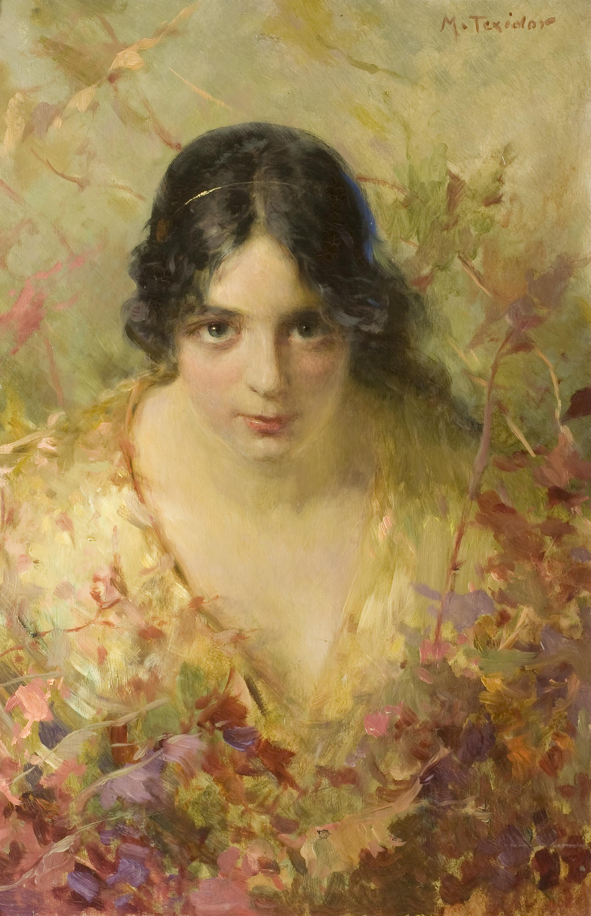 Retrat d'un personatge femení que es troba en un primer pla mirant directament als ulls de l'espectador. El realisme i la nitidesa de la línia de la cara contrasta fortament amb el vestit i el fons de l'obra. El vestit que és força escotat està fet amb pinzellades amples i curtes molt marcades que combinen grocs, verds, blaus, liles, etc. El fons de l'obra no aporta ningun tipus de representació arquitectònica o paisatgística i la pinzellada gairebé no es nota.La firma de l'artista la trobem al marge superior dret.